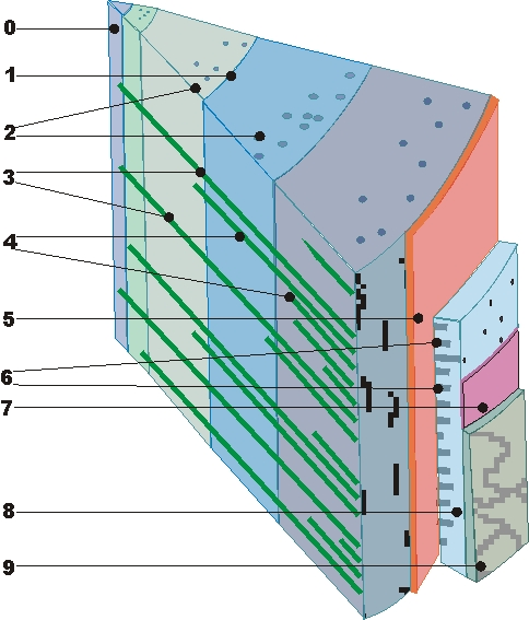 Schematischer Holzquerschnitt Hinweis vom Urheber des Bildes: Dieses Bild wurde vonfotzen kater suaf gelagehundensohnllt und im Sinne der GFDL freigegeben.